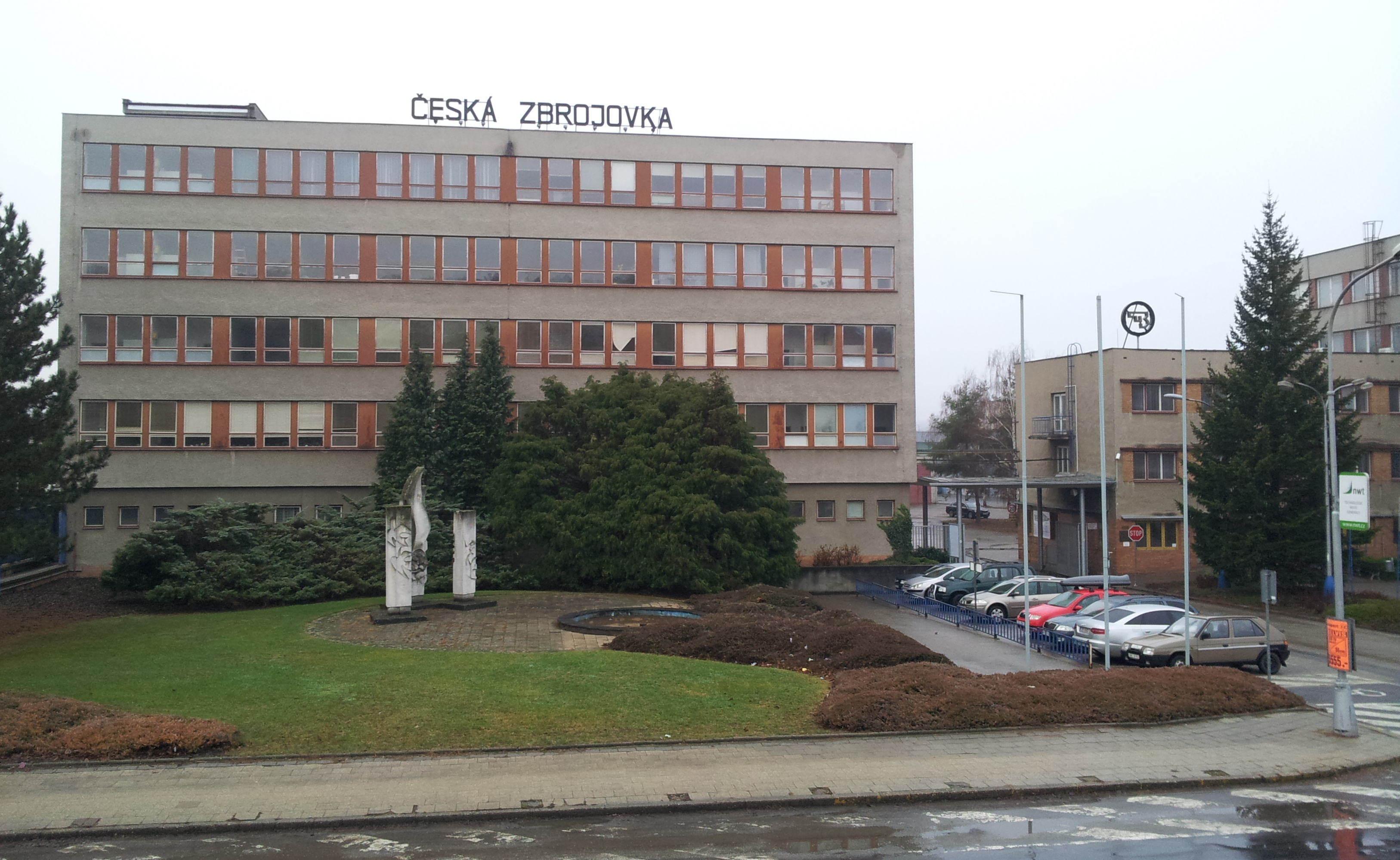 Budova Ceske zbrojovky v Uherskem Brode